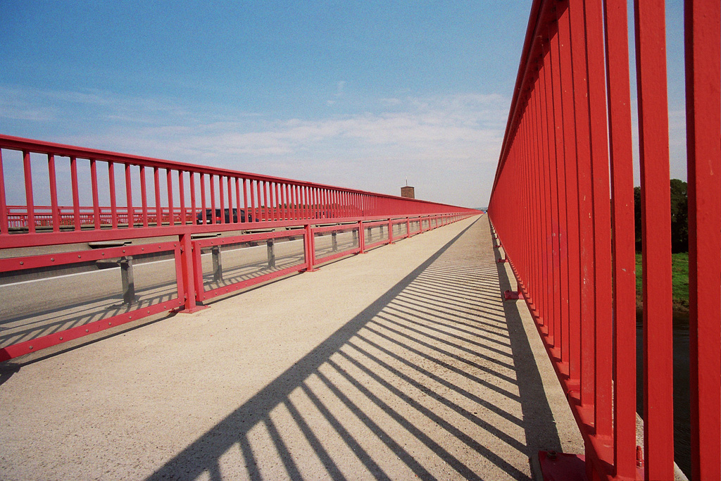 Elbbrücke near Dessau, BAB9